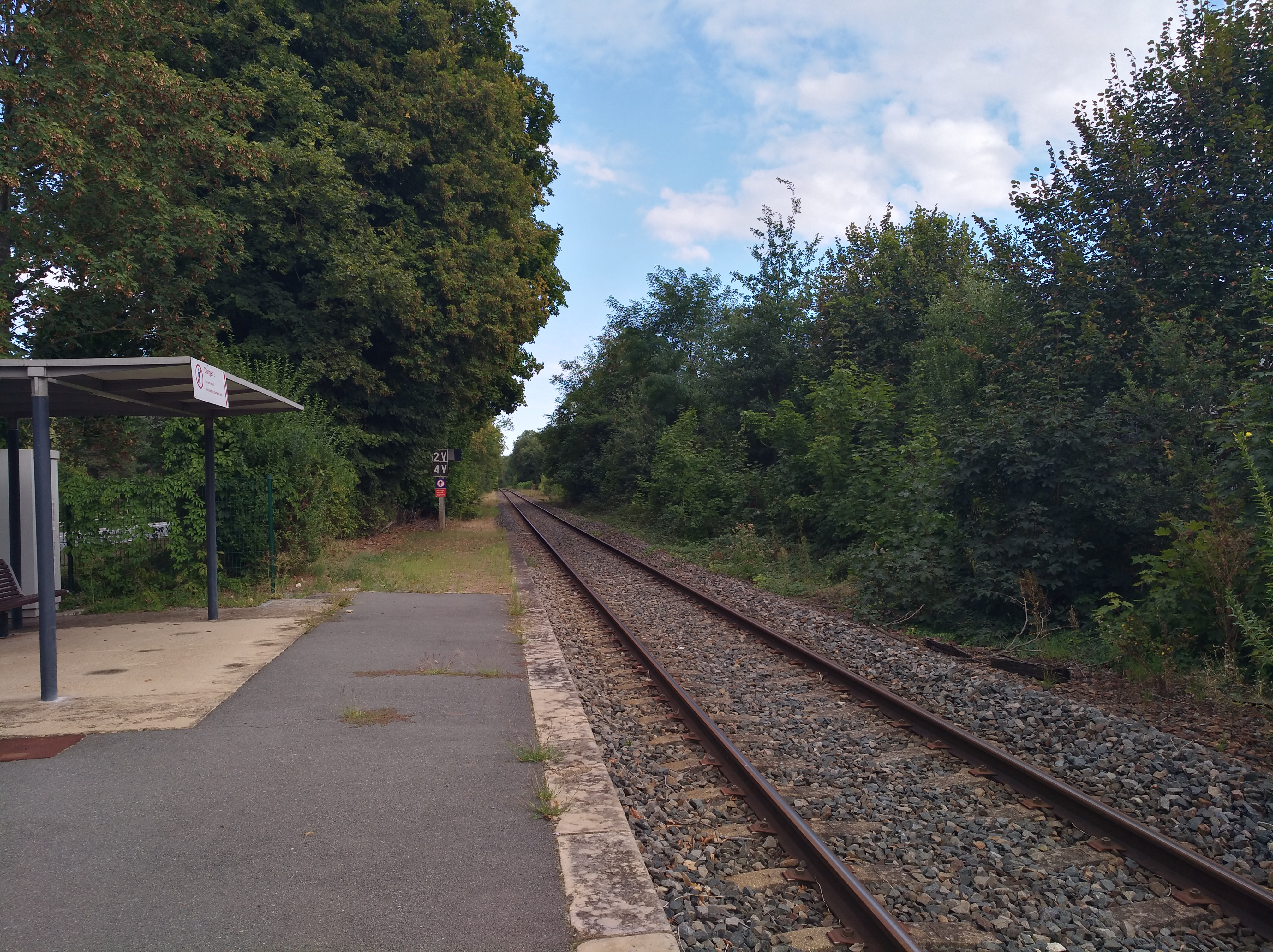 Quai de la gare de Châtillon (Rhône, France) en direction de Lyon.